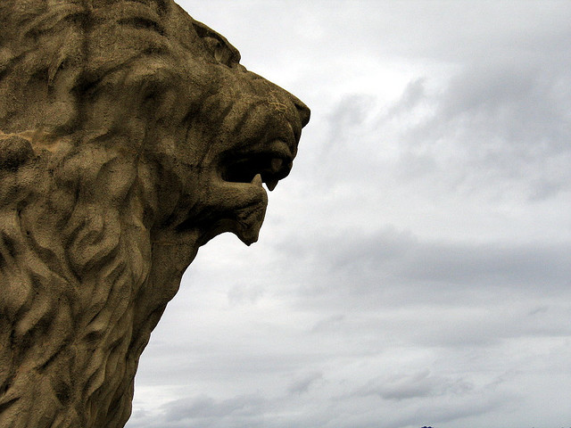 Con sus más de cuatro metros de alto, el restaurado León gigante del Pasatiempo vigila Betanzos desde su privilegiada atalaya desde hace más de un siglo.